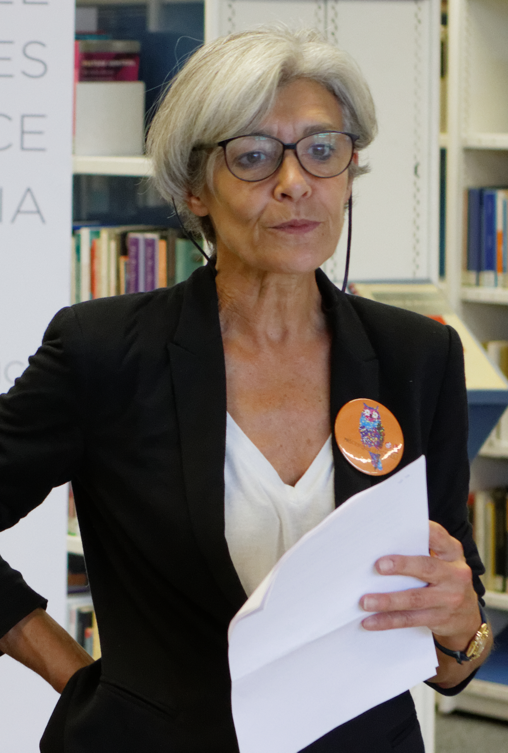 Deuxième journée femmes de science sur Wikipédia à la Cité des sciences et de l'industrie